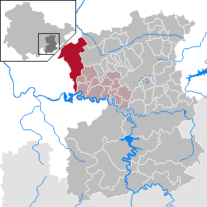 Krölpa in Thuringia - Saale-Orla-Kreis